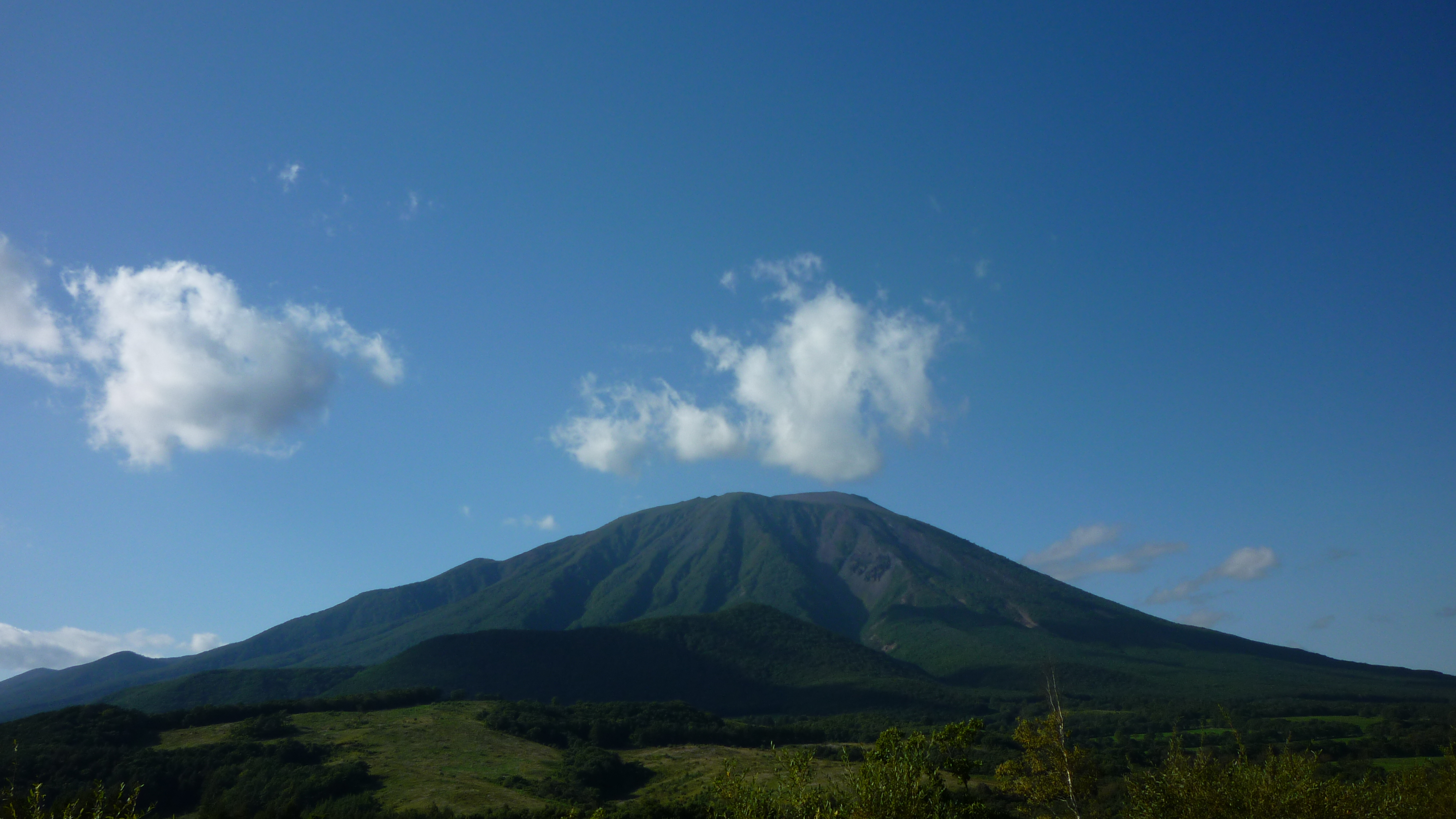 春子谷地湿原付近から望む岩手山